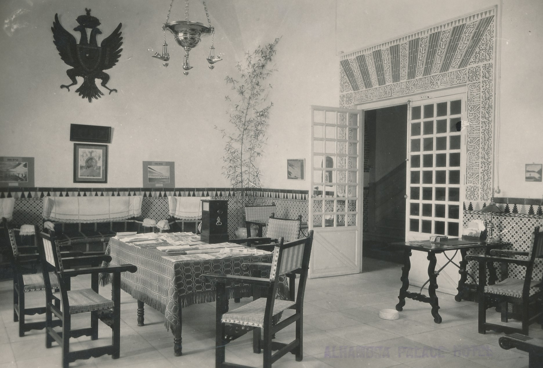 Granada Procedencia: Archivo Fotográfico del Patronato Nacional de Turismo (Alfonso XIII 1928-1931) Fotógrafo: - Registro nº: 00328 Signatura: Caja 4 Fondos: Biblioteca de la Facultad de Empresa y Gestión Pública (Universidad de Zaragoza) Legado: Luis Fernández Fuster / E.S. Turismo Huesca